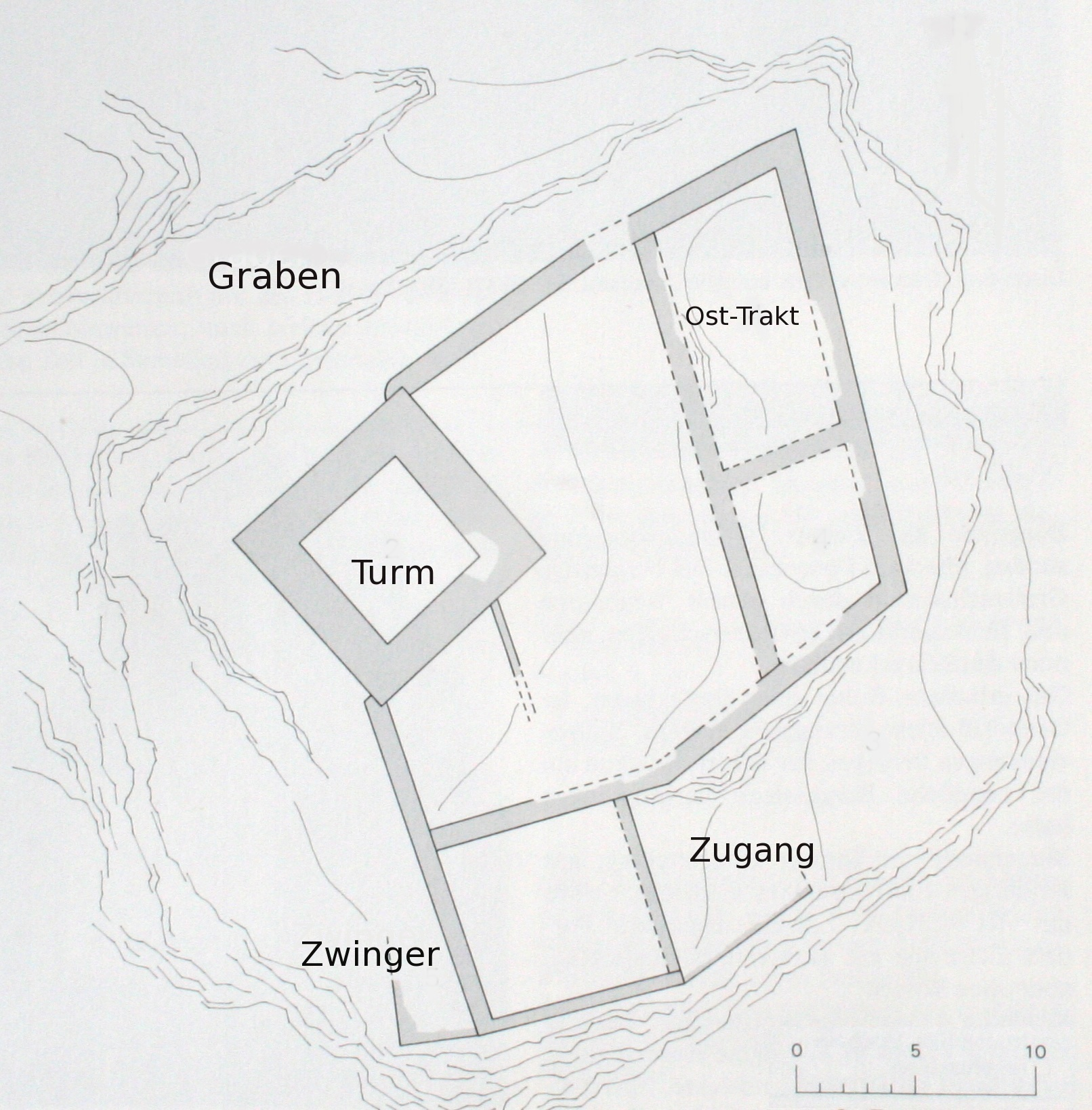 Übersichtsplan von Guardaval